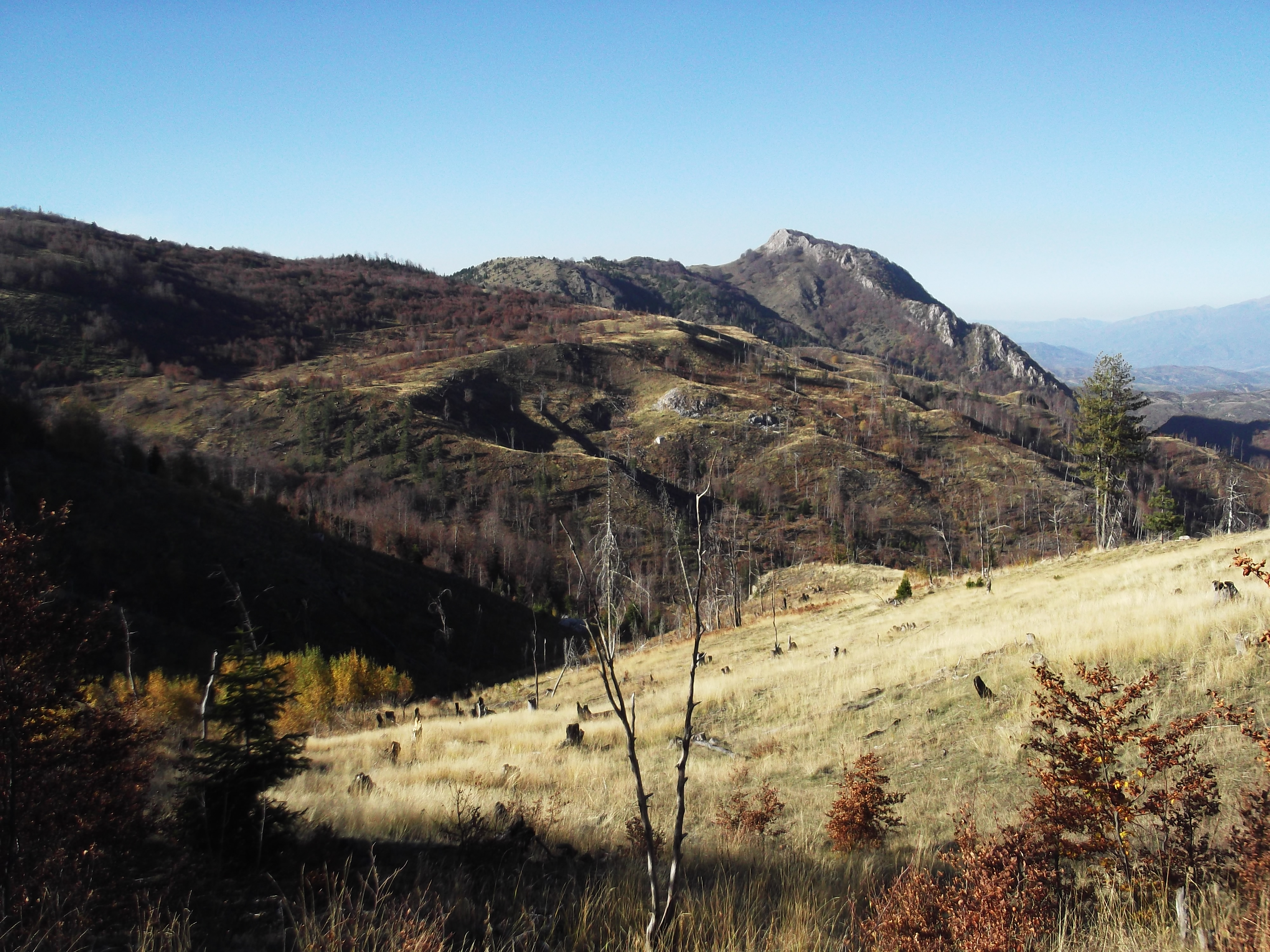 Guri i Nikes, Pogradec